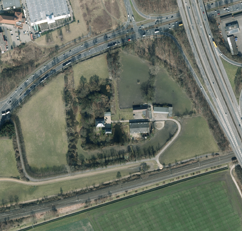 Luftaufnahme von Haus Vorst im Bereich Stadt Frechen (NRW). Rechts Autobahn A1, oben Bundesstraße B264, unten Bahnstrecke Köln–Frechen